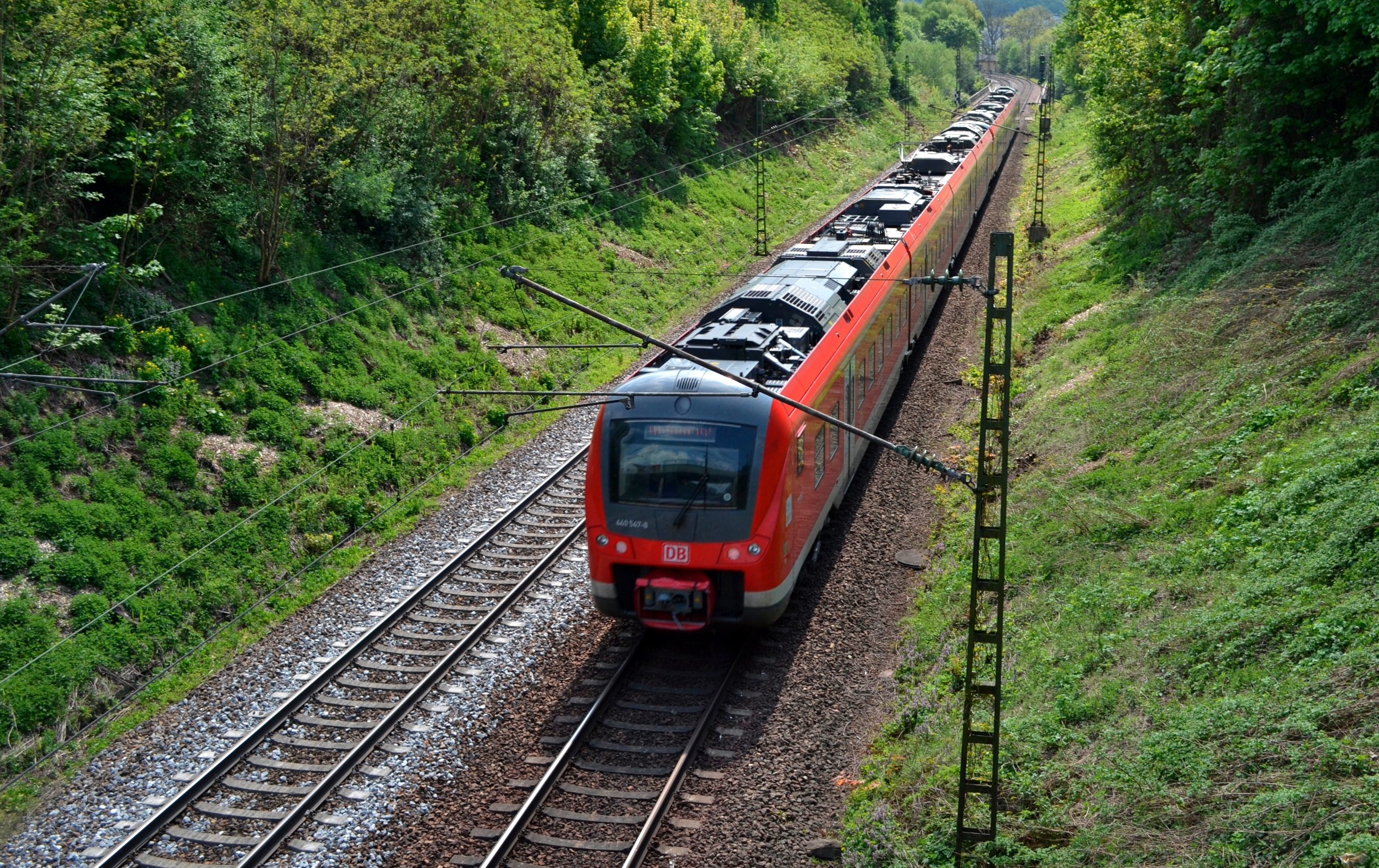 Nahverkehrszug Alstom Coradia LIREX (440 547-8) kurz vor dem Bahnhof in Vilshofen an der Donau.